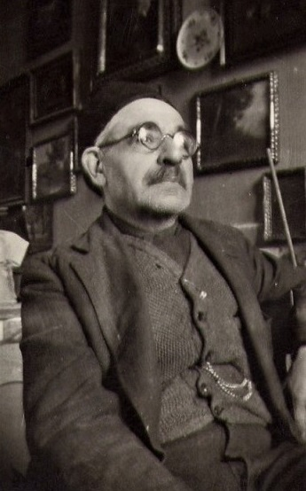 Cesare Camporesi